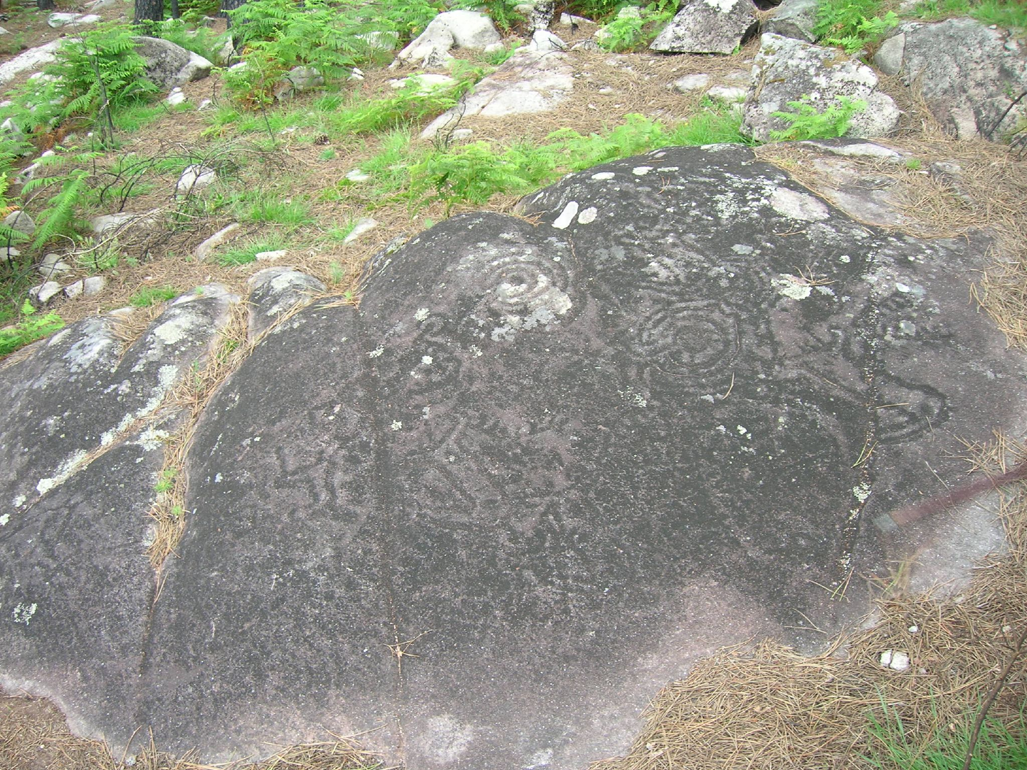 Laxe dos Cebros - Petróglifos de Fentáns - Cotobade - Pontevedra